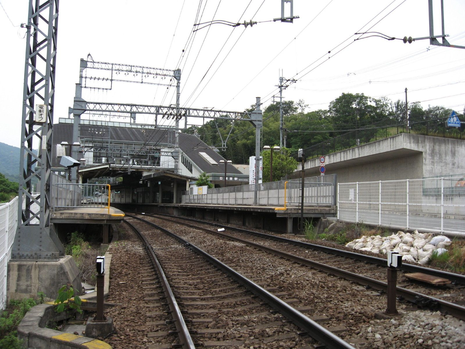 近鉄･関屋駅 (2006.06.11)